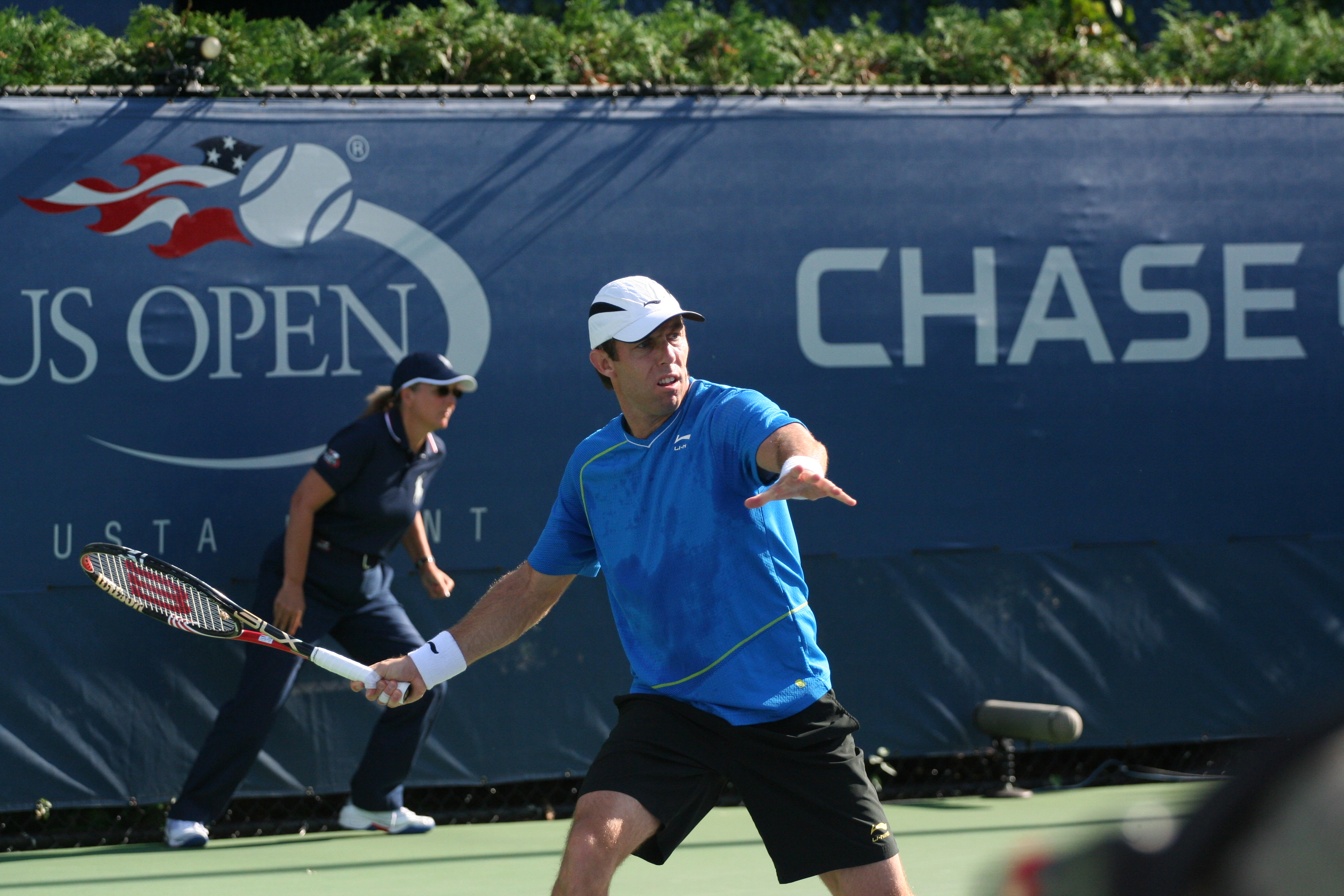 U.S. Open Sept. 4, 2010